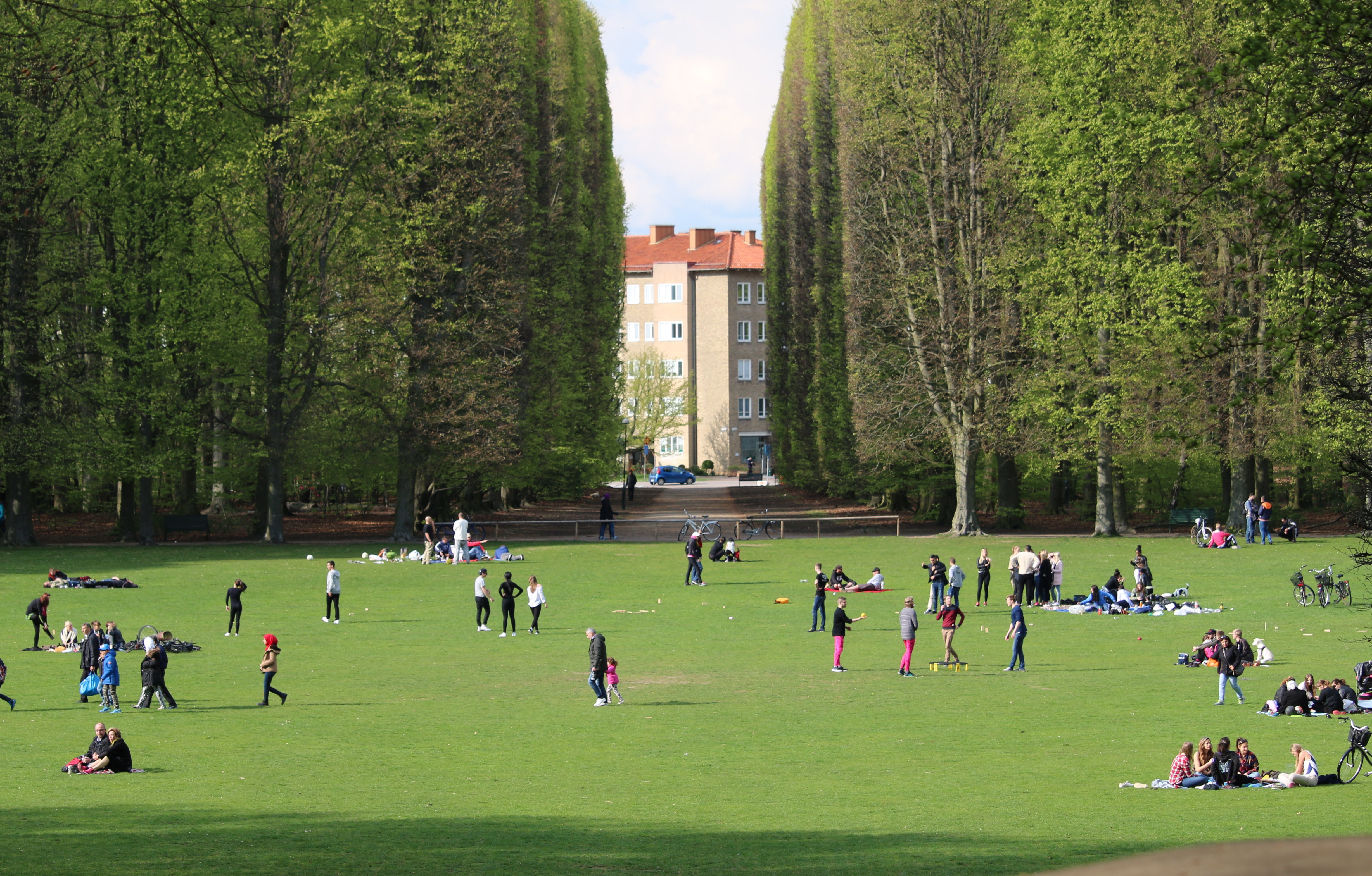 Tallriken i Pildammsparken, Malmö